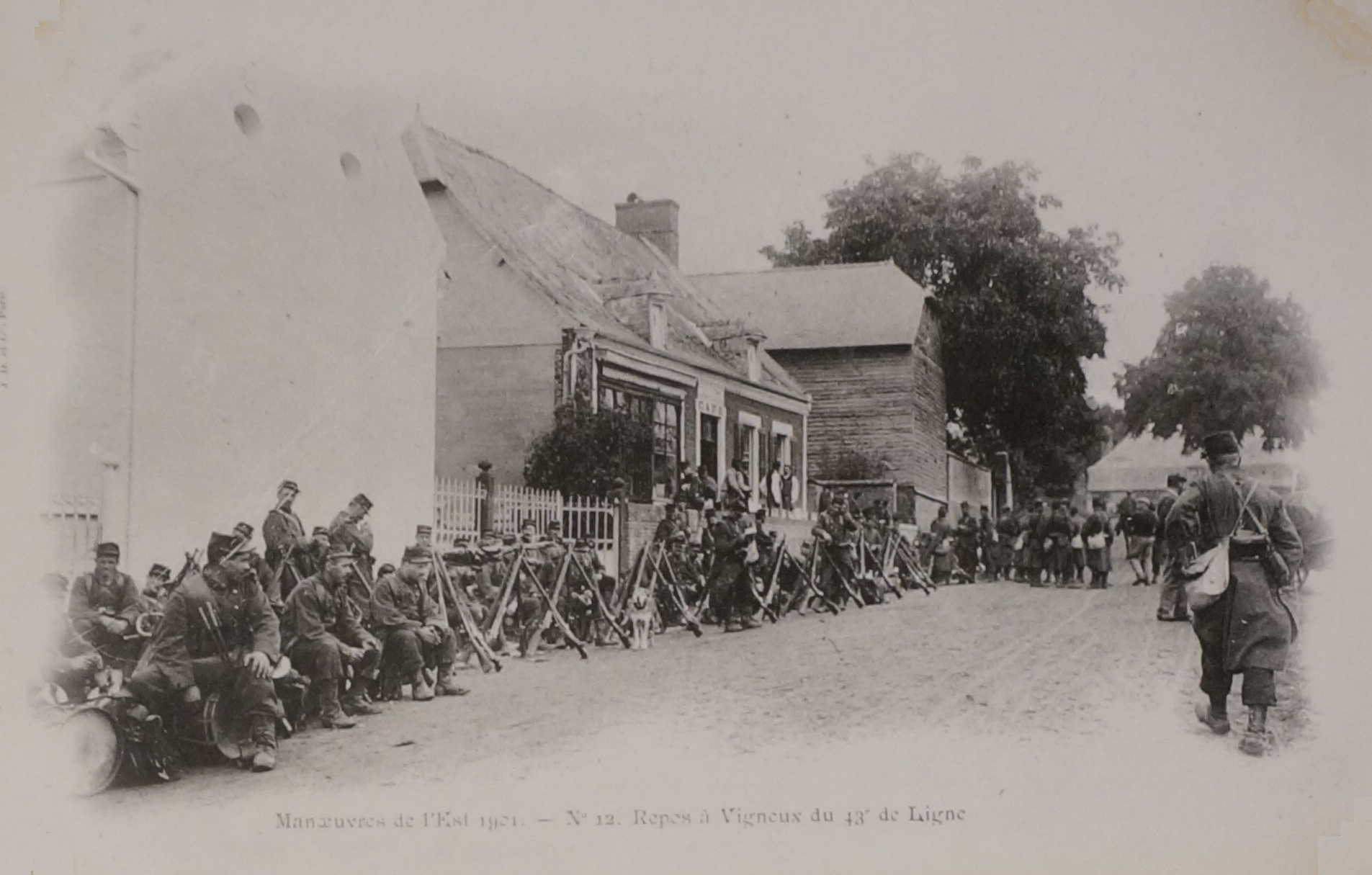 lors des grandes manœuvres de l'Est de 1901. BM Reims cote CPA t4. Publication de 1901 en cartes postales.